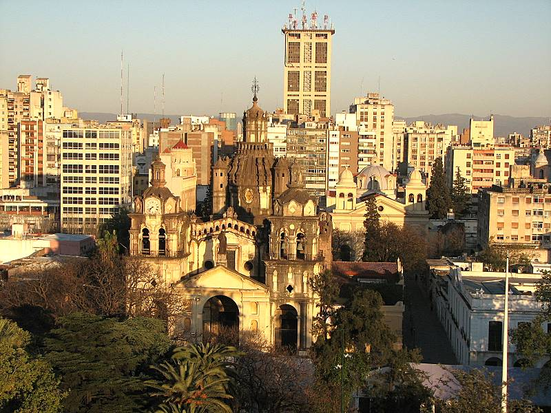 Catedral de Córdoba, en el centro de Córdoba.